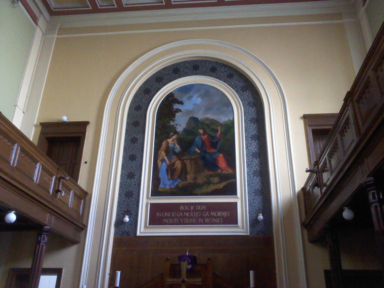 Slika nad prižnico in oltarjem v Evangeličanski cerkvi Primoža Trubarja v Ljubljani. Jn 4,24: Bog je Duh, in oni, ki ga molijo, ga morajo moliti v duhu in resnici.